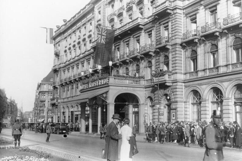 Berlin, Wilhelmplatz, Hotel "Kaiserhof" ADN-Bildarchiv Berlin 1928 Das zum Empfang des Nordpolfliegers Wilkins geschmückte Hotel "Kaiserhof" am Wilhelmplatz. 16345-28